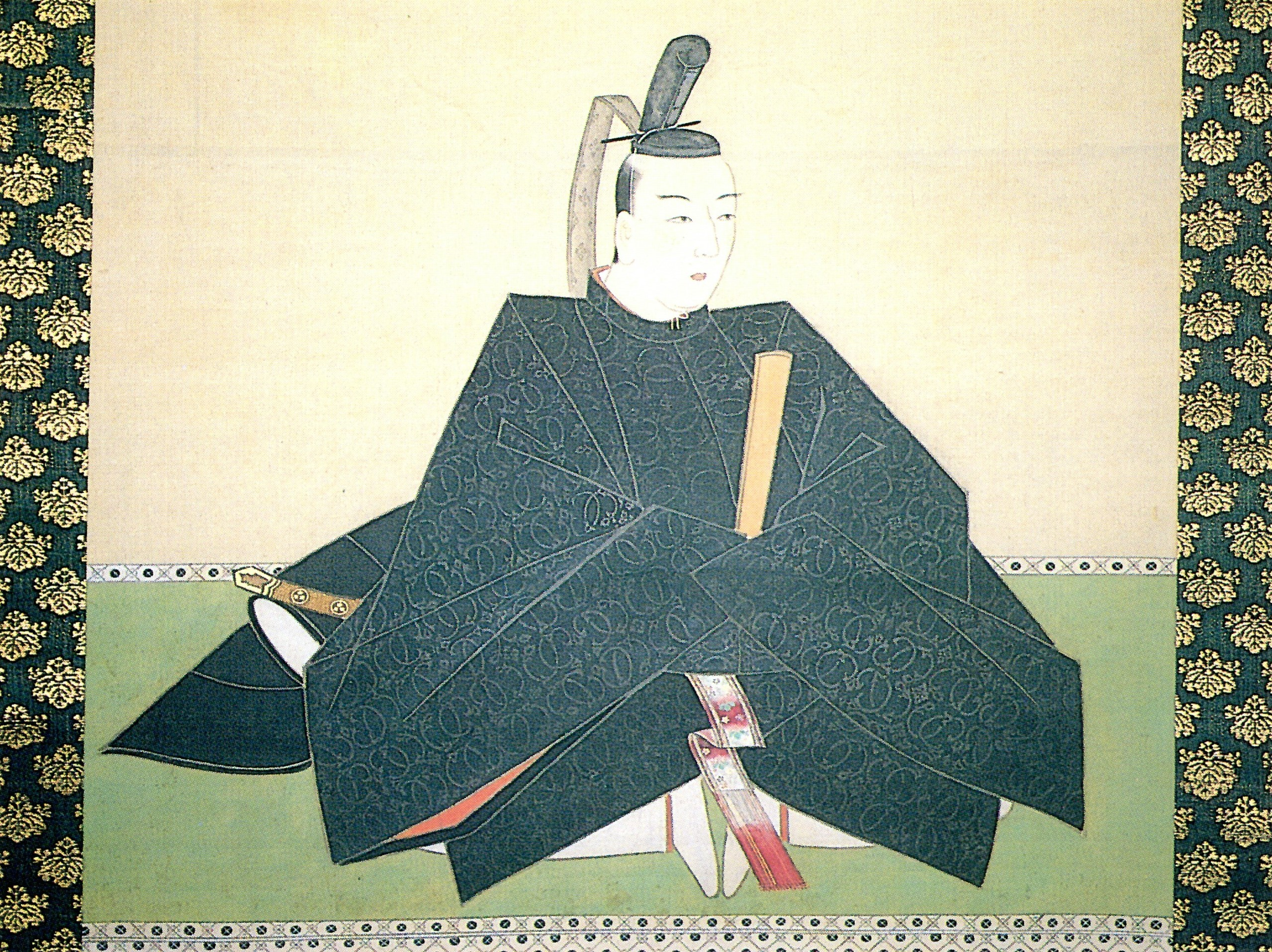 松平直矩の肖像。